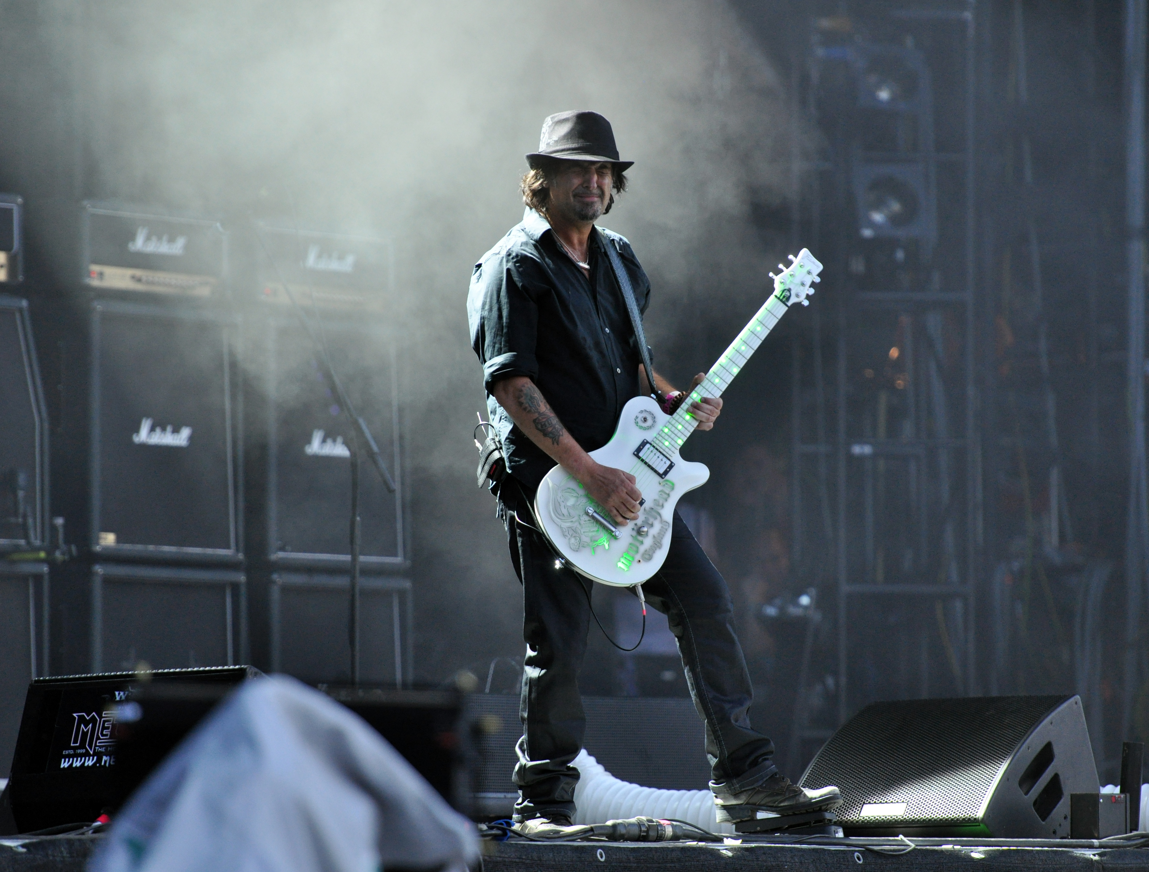 Motörhead at Wacken Open Air 2013